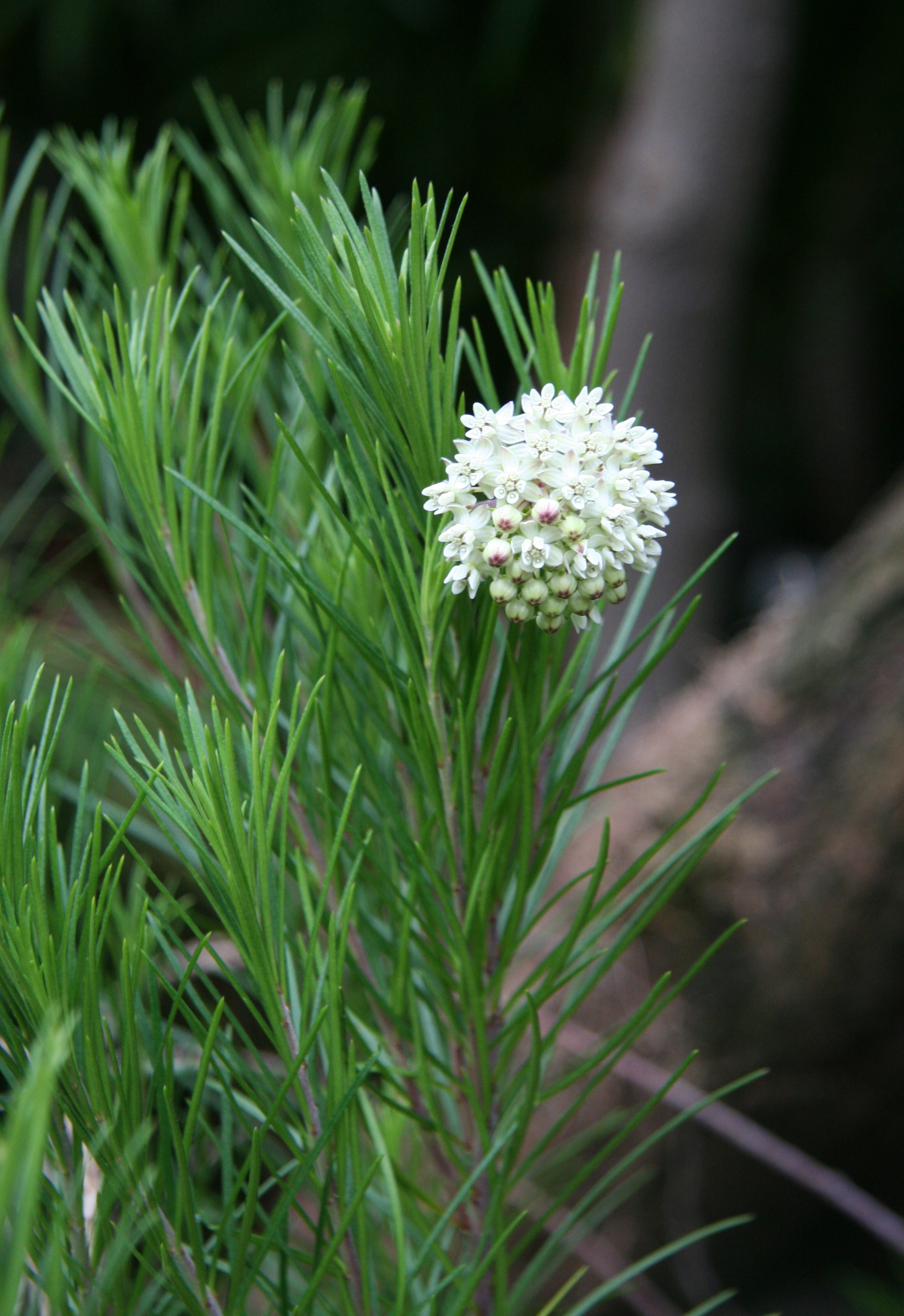 Asclepias linaria im Botanischen Garten Dresden